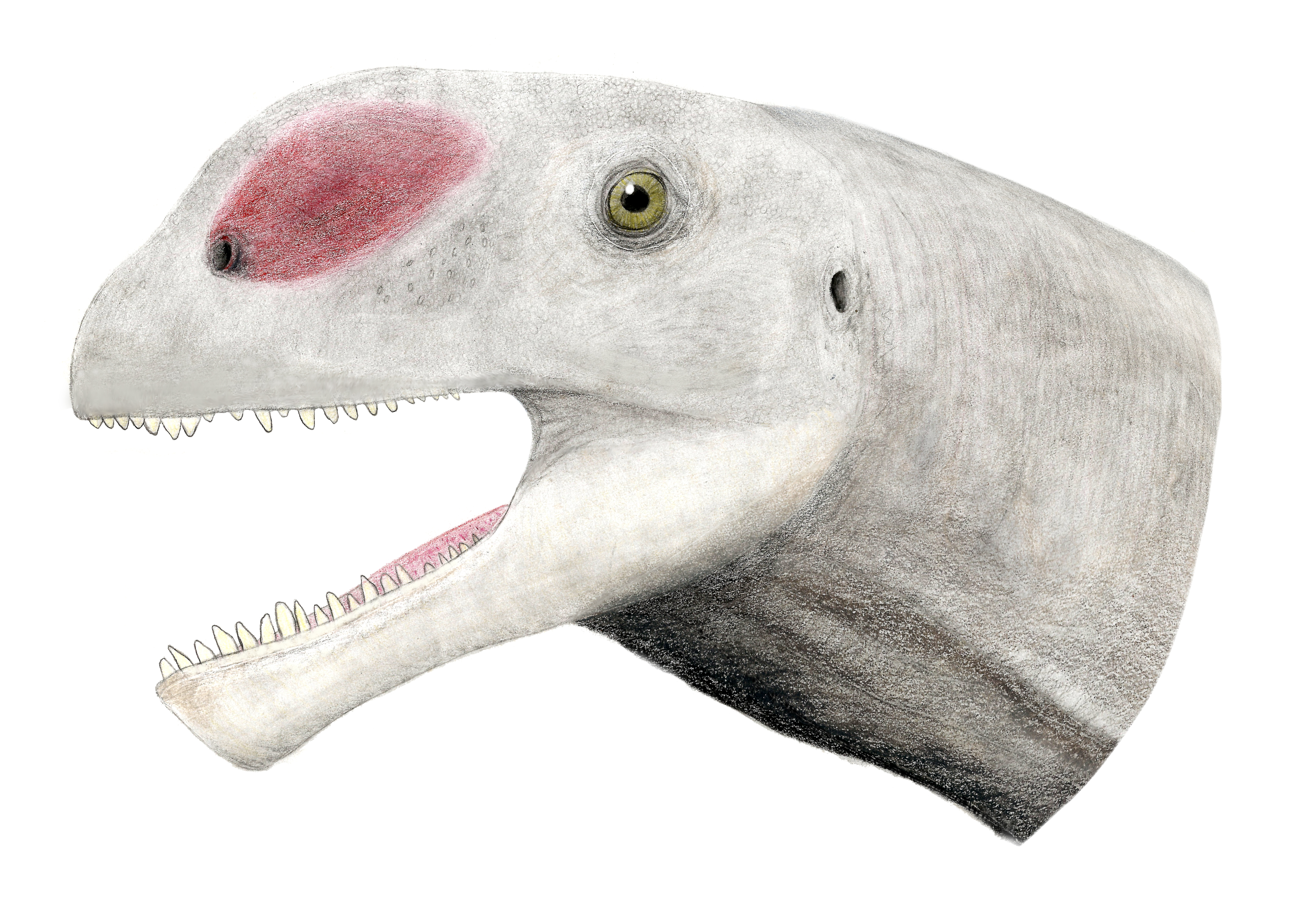 Cabeza y cuello de un Abrosaurus